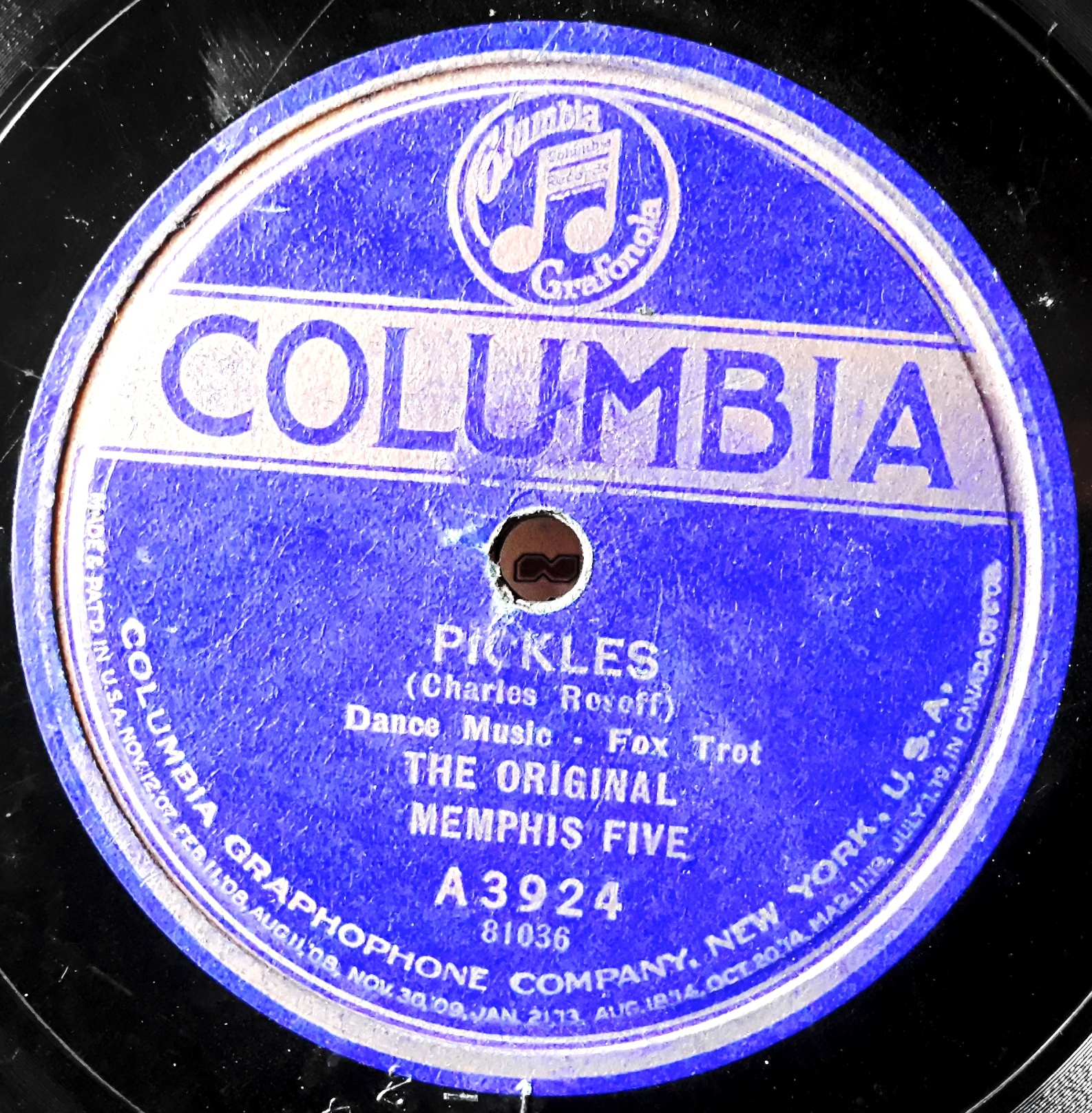 Label der US-Marke Columbia aus der ersten Hälfte der 1920er Jahre, frühe Jazzplatte